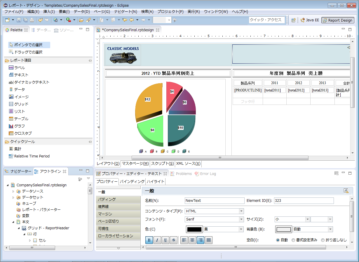 オープンソースEclipse BIRT Report Designer日本語版のスクリーンショット。Windows 7 64bit Service Pack 1、BIRT Report Designer Version: Luna Release (4.4.0) Build id: 20140612-v2.2 M6、Eclipse IDE Version: 4.4.0.v20140606-1558 Build id: I20140606-1215を使用。